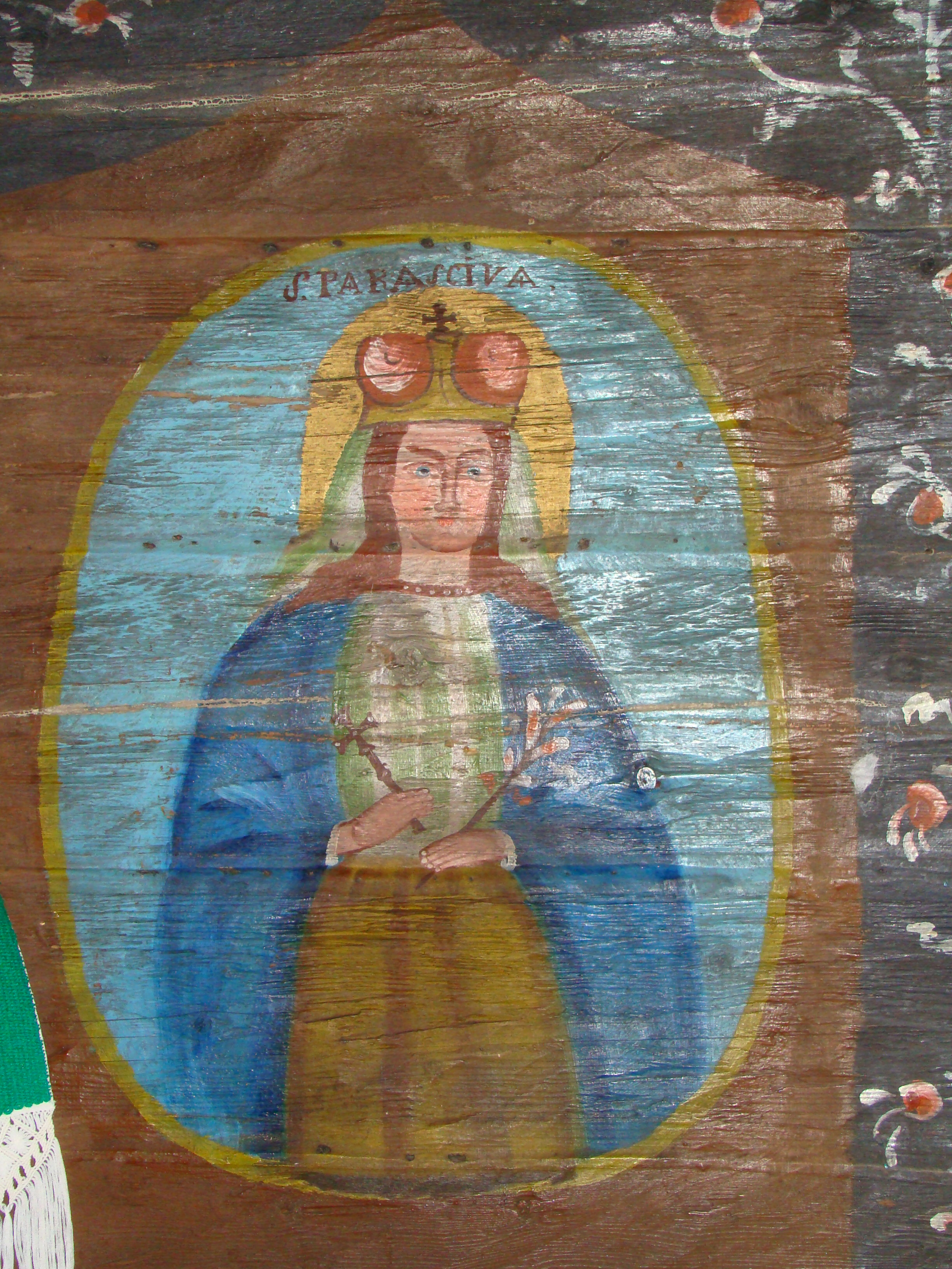 Biserica de lemn din Poiana Botizii-interioare